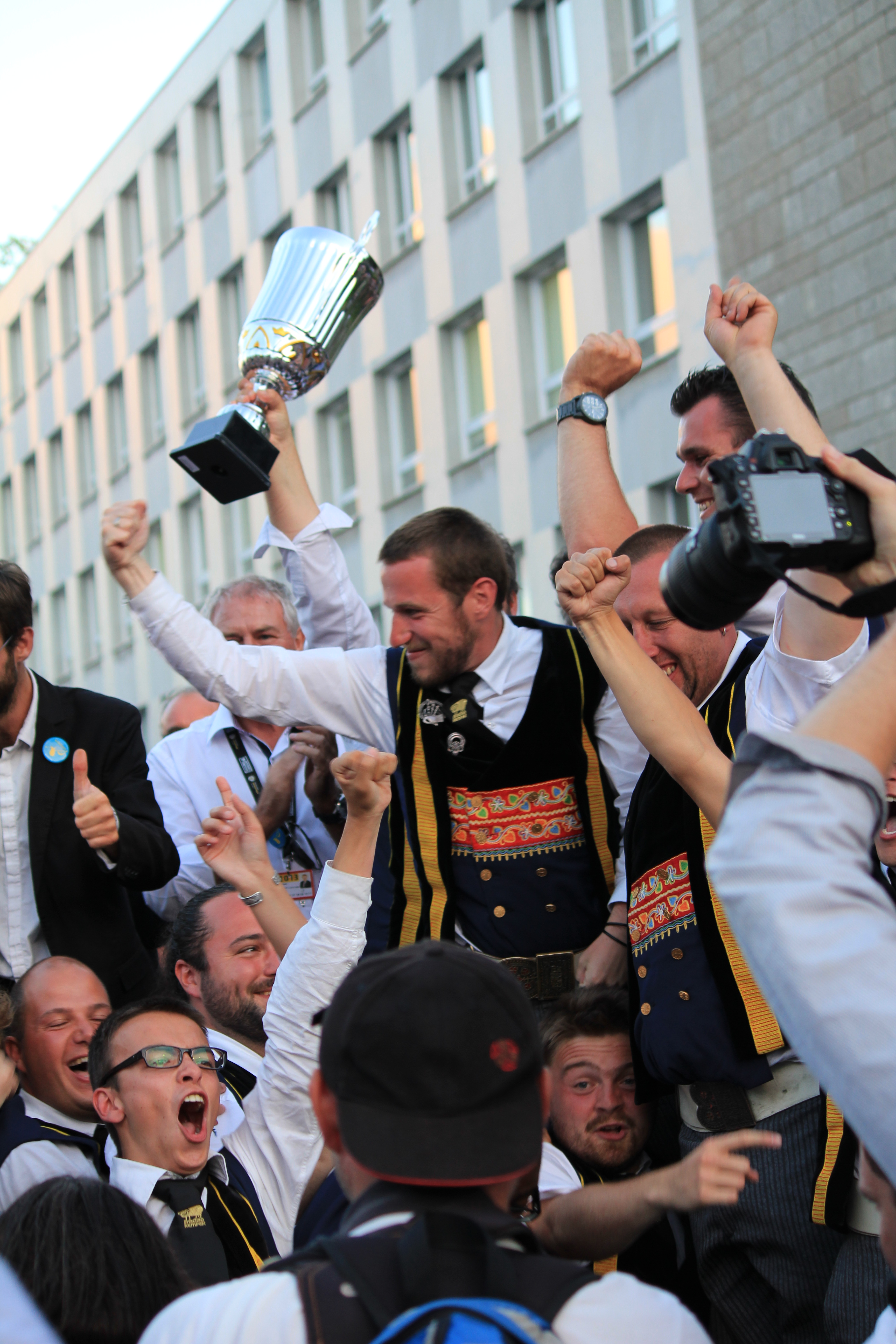 Annonce des résultats du championnat national des bagadoù 2013 dans le cadre du festival interceltique de Lorient : Bagad Kemper